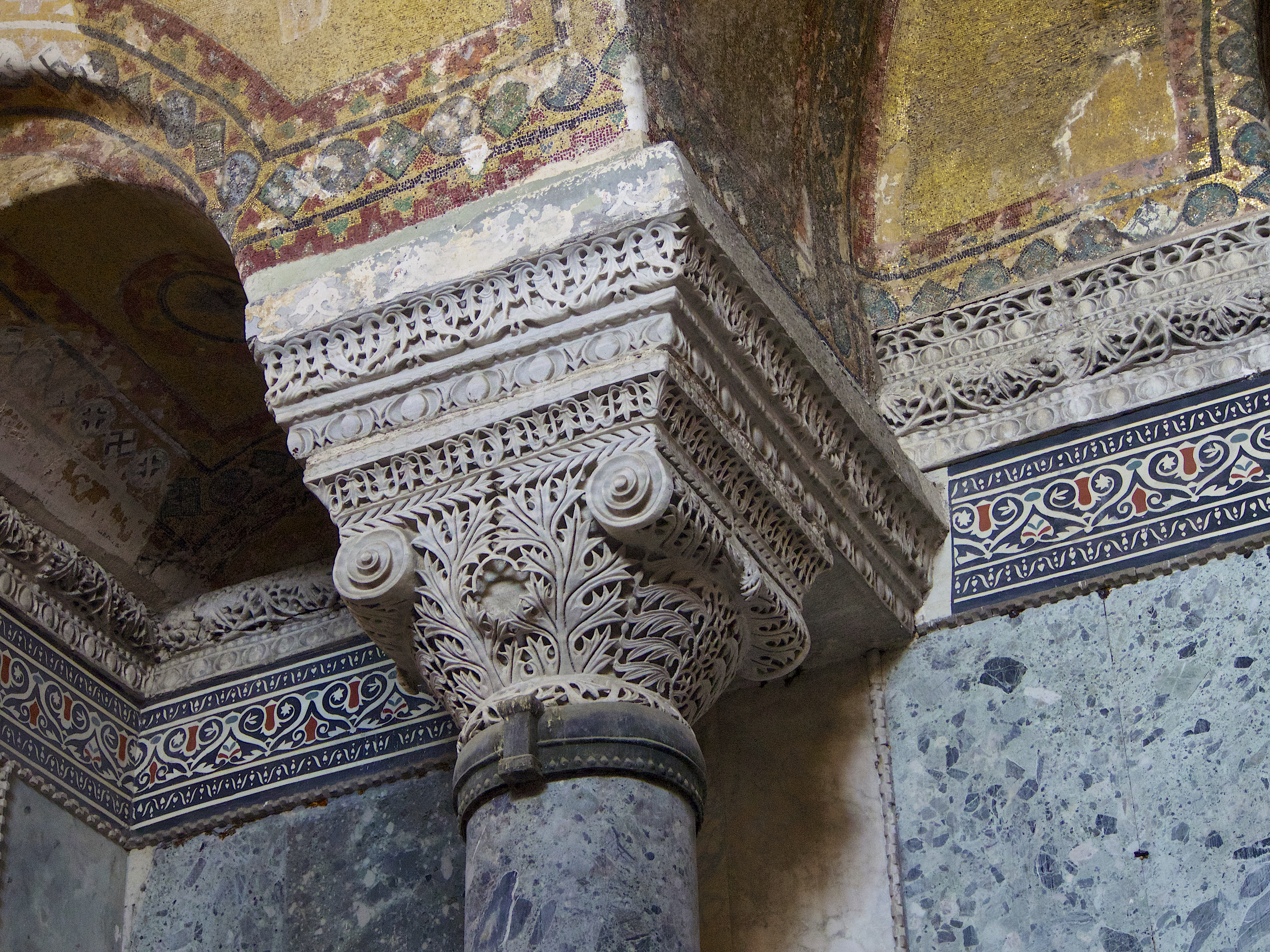 Hagia Sophia Istanbul, Turkey